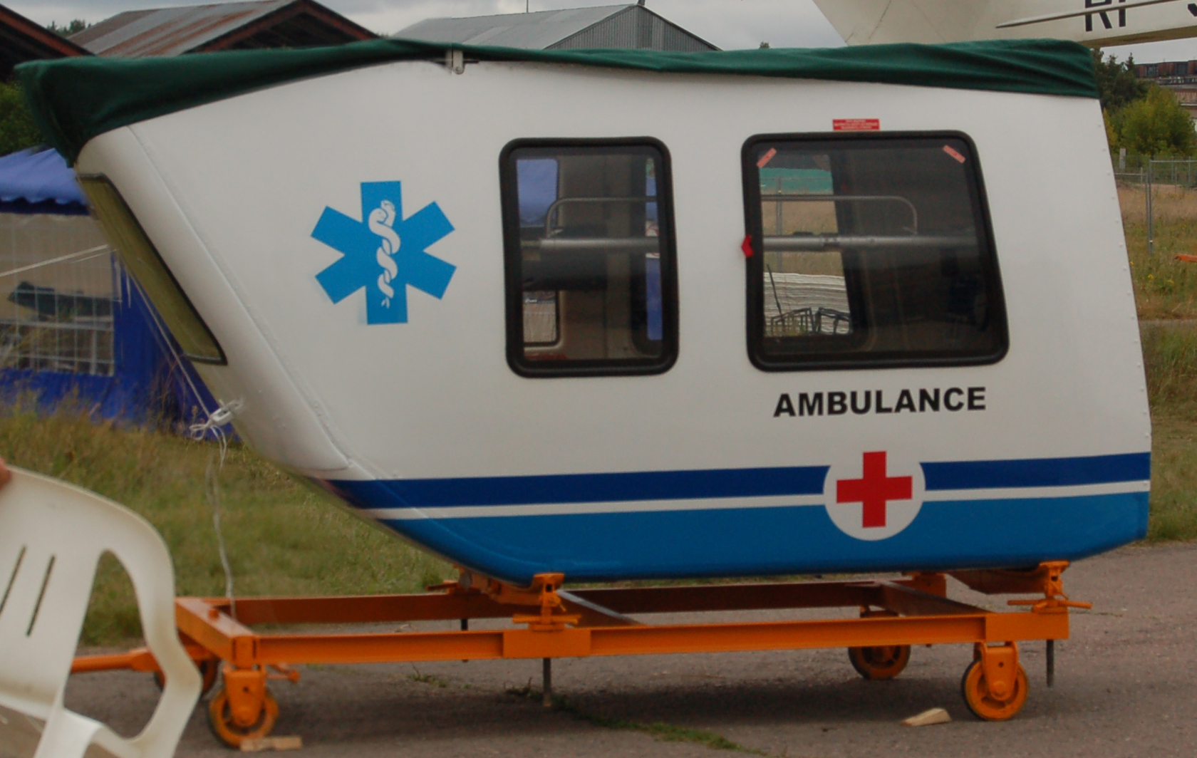 Модуль санитарного транспорта для вертолёта Ка-226. МАКС-2009